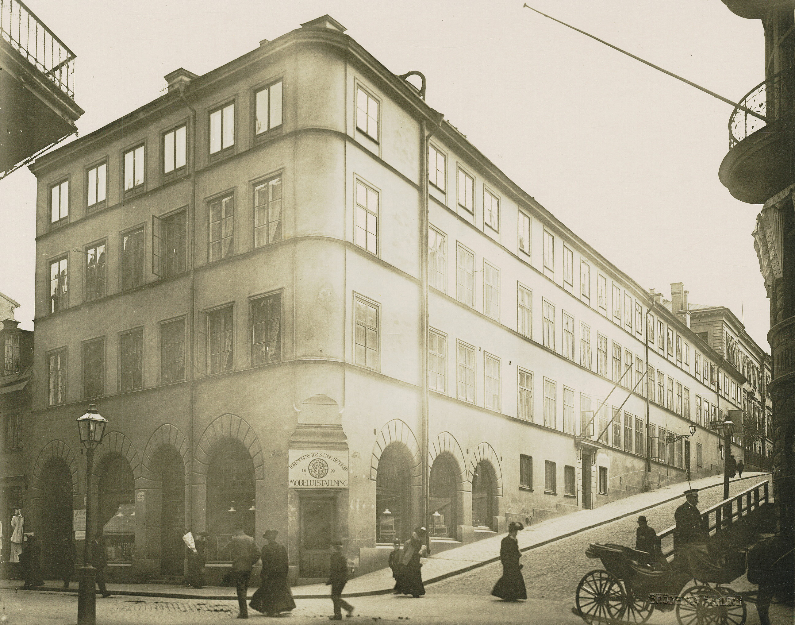 Hörnet Riddargatan, Grev Turegatan (dagens kvarter Riddaren 23)